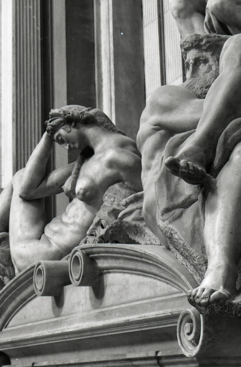 Firenze. Basilica di San Lorenzo. Interno: Michelangelo, Tombe medicee, particolari sculture ed elementi architettonici. Zoom Tamron.] Servizio fotografico : Firenze, 1975 / Paolo Monti. - Strisce: 6, Fotogrammi complessivi: 32 : Negativo b/n, gelatina bromuro d'argento/ pellicola ; 35 mm. - ((Sul portanegativi: N[I]K[MA]T FP4. - Una striscia di nastro adesivo bianco tiene incollati i fotogrammi nn. 19A-20A ai bordi superiori e inferiori. - Possibile sottoserie: 25A-32A = Tombe medicee, particolari architettonici. - Occasione: Pubblicazione. - Fonte: Agenda di Paolo Monti: Leica 1501-3000 Controllo numerazione (1950-1978), presso Archivio Paolo Monti. - Fonte: Monografia: Michelangelo, n. 14, collezione I grandi di tutti i tempi, Milano, A. Mondadori (1976). - Fonte: Fattura di Paolo Monti: IV. Commesse/ Fattura n. 04 (1976/03/09), presso Archivio Paolo Monti